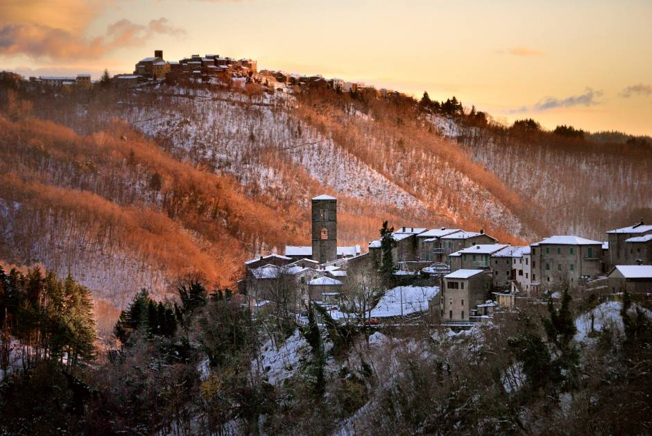 Il paese di Crespole in inverno con Serra Pistoiese sullo Sfondo